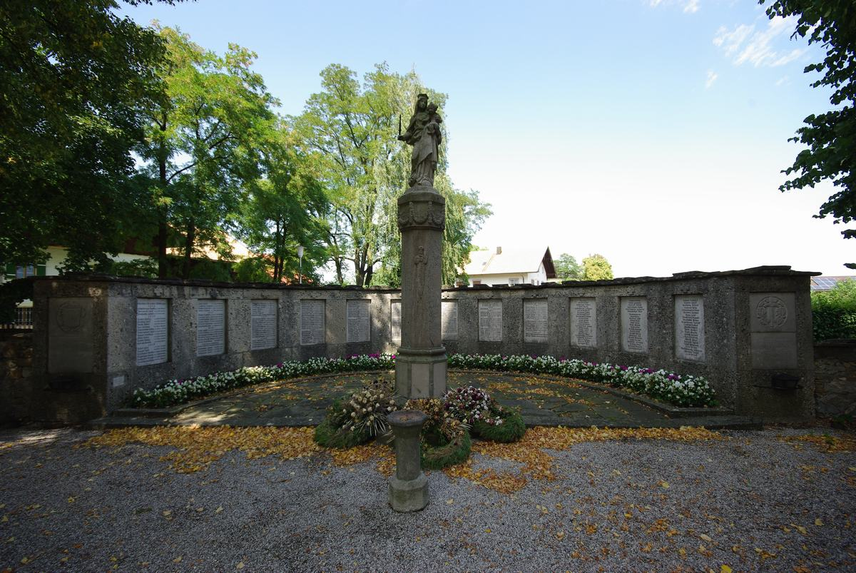 Gumpinger Str. 22, 83404 Ainring Katholische Pfarrkirche Mariä Himmelfahrt. Mariensäule mit KriegergedenkstätteThis is a photograph of an architectural monument.